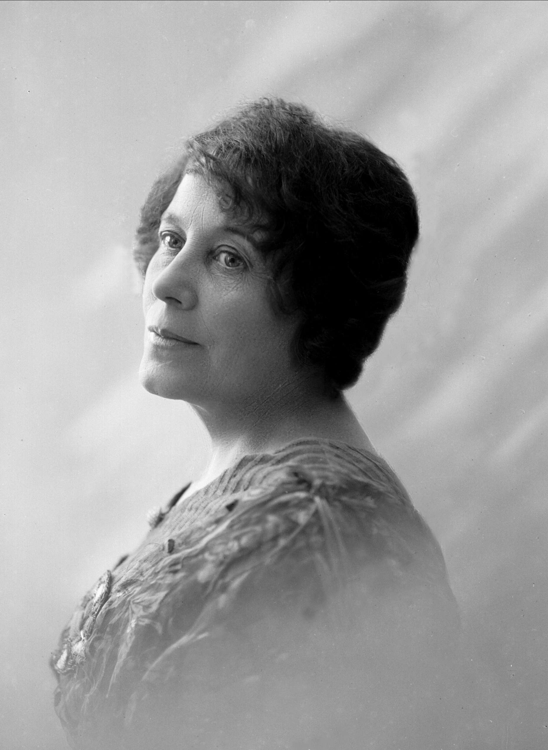 Bilde av den norske skuespilleren Ragna Wettergreen